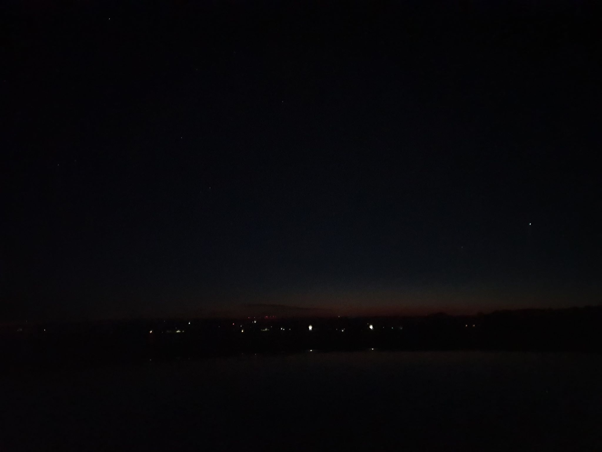 Mitternachtsdämmerung am 29.06.2019 um 01ː31 Uhr MESZ vom Nordhang des Wiehengebirges auf ca. 170 m ü NN bei Obermehnen bei 52° 17′ 8″ N, 8° 34′ 40″ O